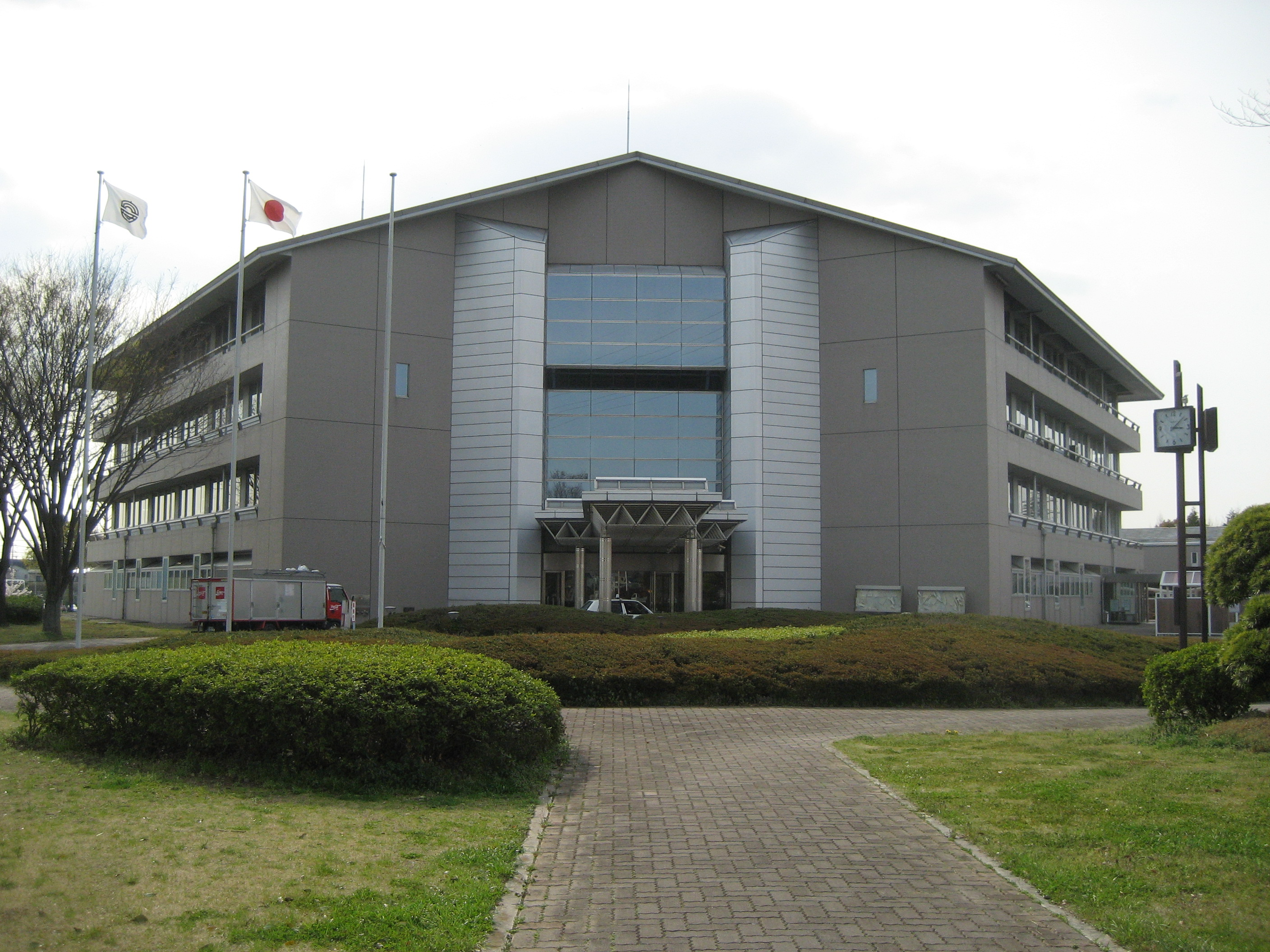 白岡町役場庁舎